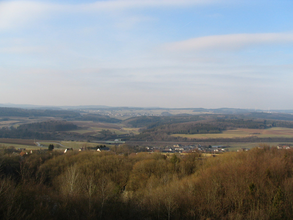 Aussicht von der Vulcano Infoplattform in Steineberg (Eifel) Blick über den Ortsrand von Steineberg und über die nördlich gelegene Ortschaft Steiningen, in der Ferne liegen Darscheid, Boverath und Daun